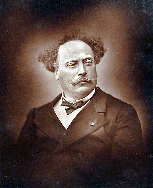 Portrait d'Alexandre Dumas fils